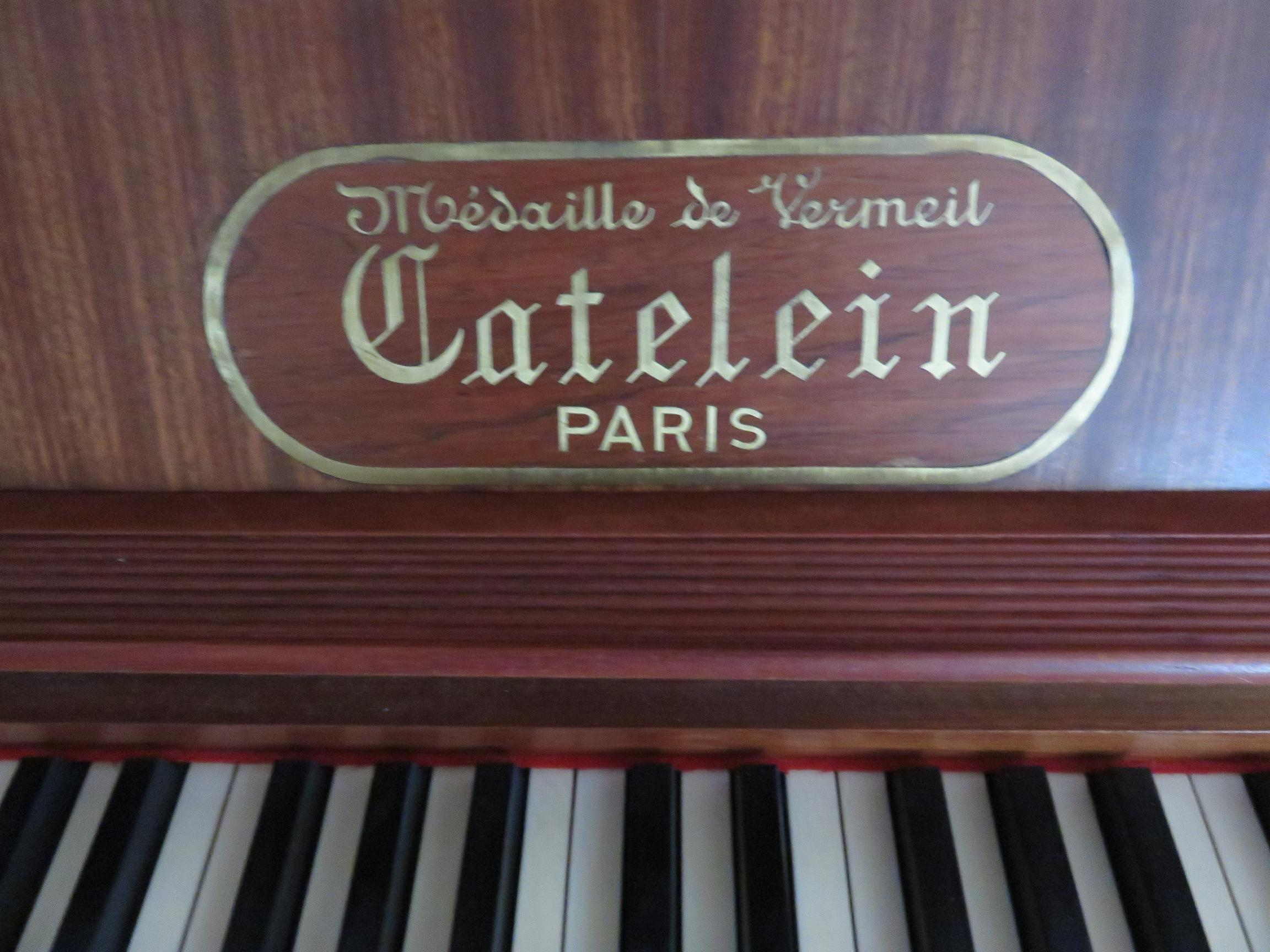 piano